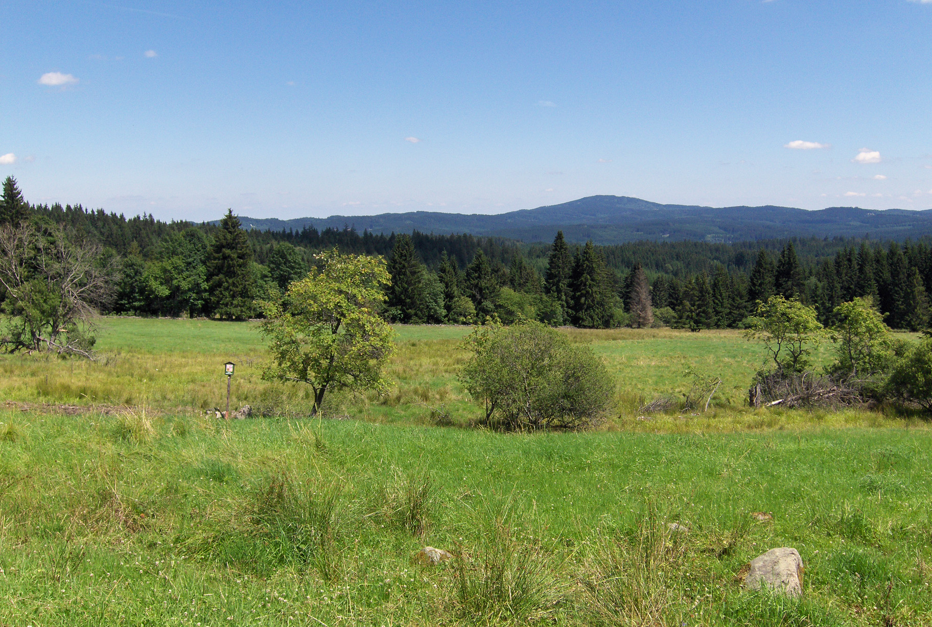 NPP Prameniště Blanice z Horní Sněžné, dále vojenský újezd Boletice